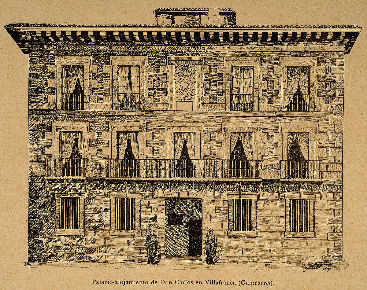 Casa solar del mayorazgo fundadado por D. Francisco de Abaria, Capitán de Mar y Guerra en 1655, uno de los libertadores de Orán (1681), General de la armada de Carlos II en las flotas de Nueva España (1682), hasta su muerte, en 1688. Situada en Villafranca de Oria (hoy Ordicia u Ordizia), en la esquina de la Plaza Mayor, tiene por escudo una banda cargada de cuatro paneles puesta en medio de dos lobos andantes, bordura con ocho aspas. Es un Bien de Interés Cultural (BIC). Dicho Palacio fue propiedad de Tirso de Olazábal y Lardizábal, Conde de Arbelaiz, y en él se alojó Don Carlos cuando, por ocasión de las Juntas carlistas que allí se celebraron durante la guerra civil, estuvo en Ordizia, el 6 de julio de 1875, para jurar los Fueros de Guipúzcoa. El Acto - la proclamación oficial del Rey con arreglo a fuero - se celebro al día siguiente con la extraordinaria solemnidad de que son testimonios los documentos de aquella época.